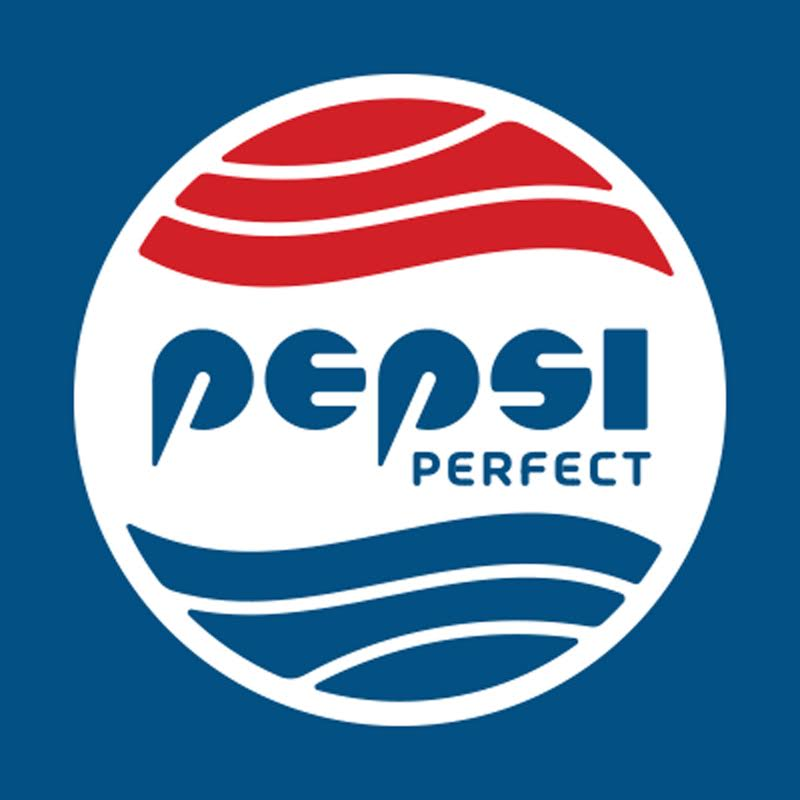 Logo del nuevo producto de la Familia Pepsi